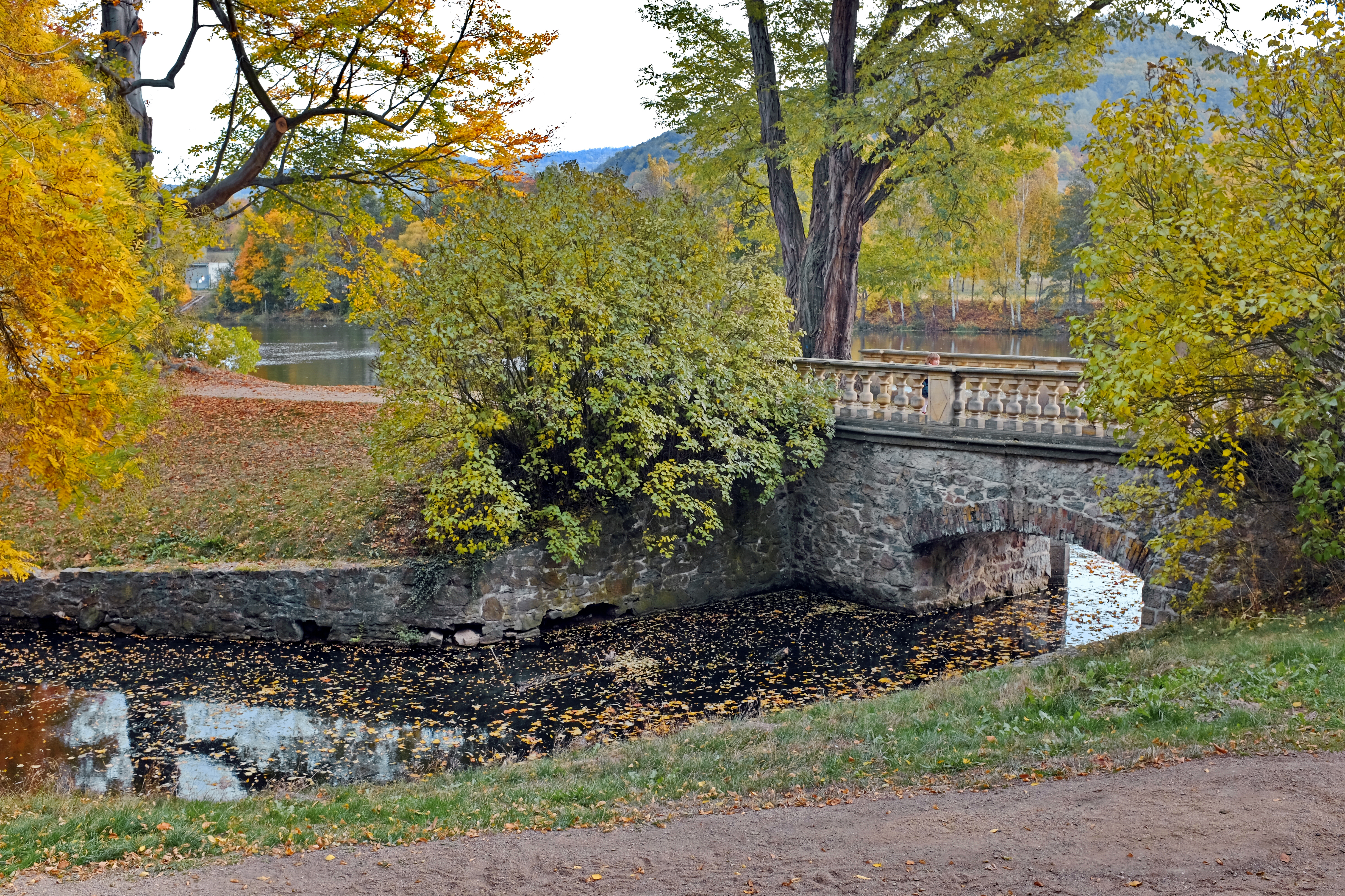 Široký potok na soutoku s Ohří v Klášterci nad Ohří